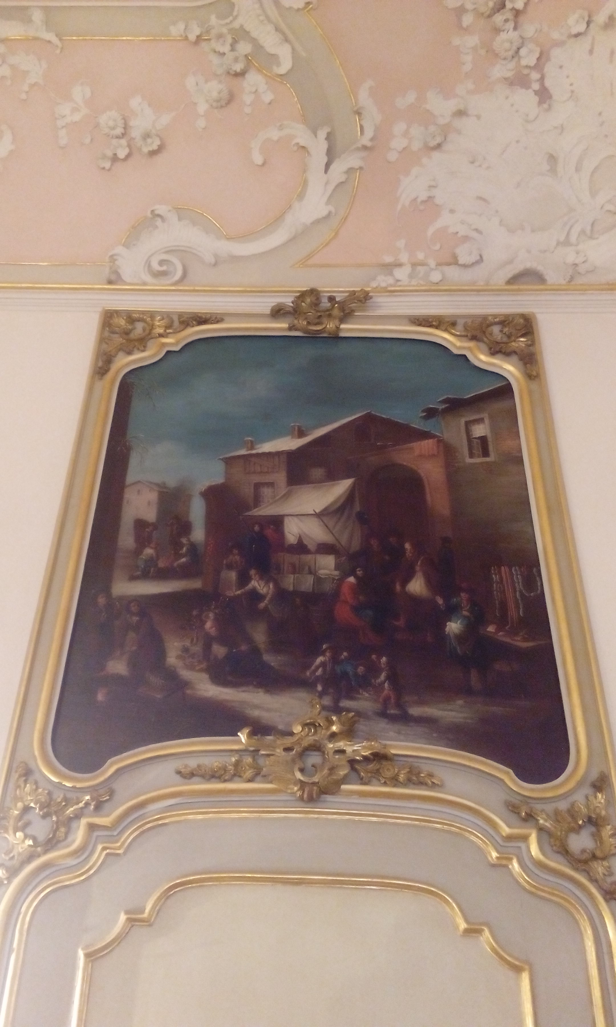 una tela dell'interno